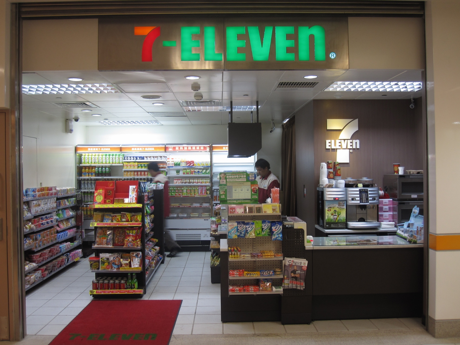 台北捷運台北橋站穿堂層統一超商